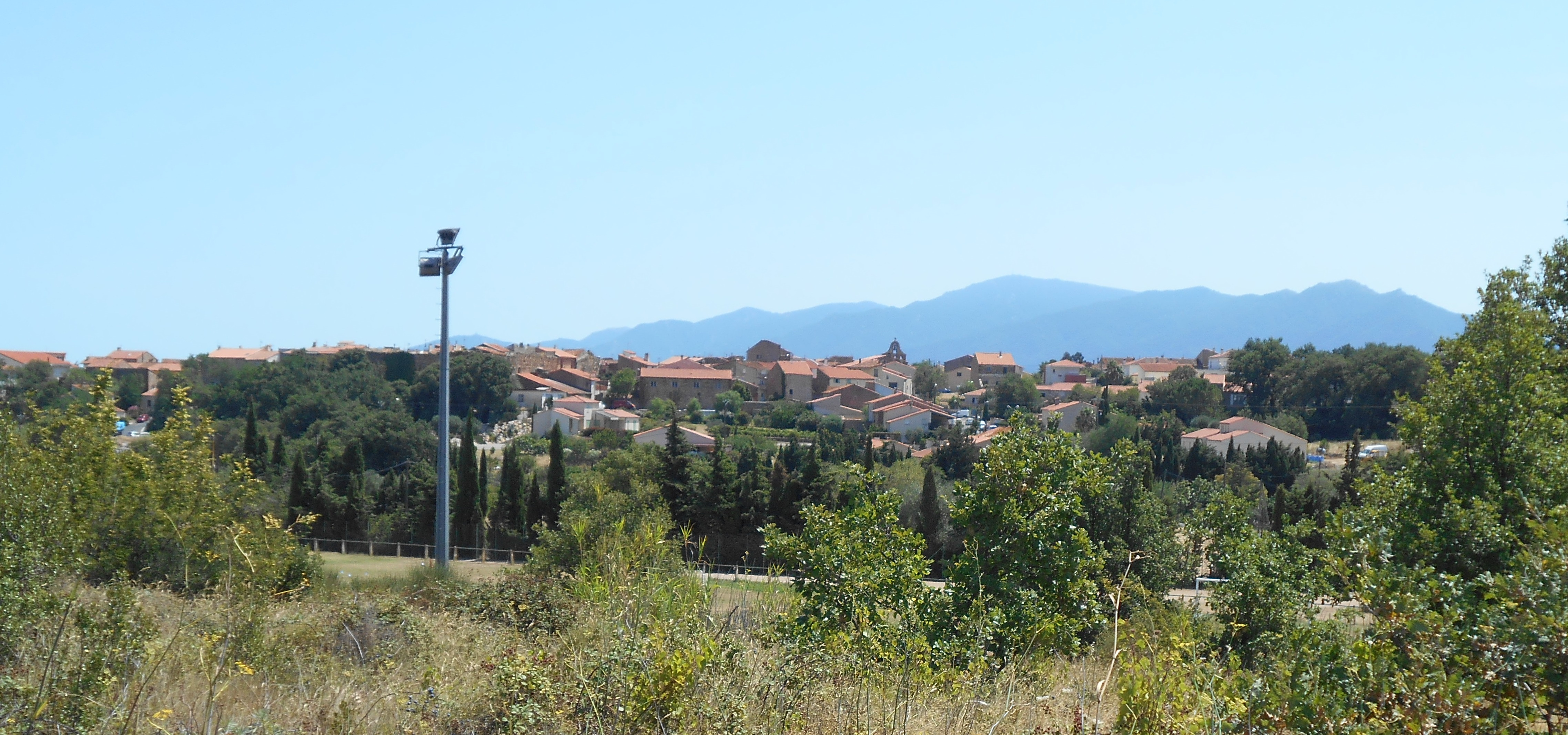 Vista general des del nord